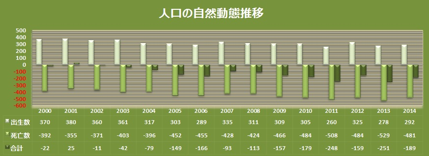 2000年以降における見附市の自然動態推移